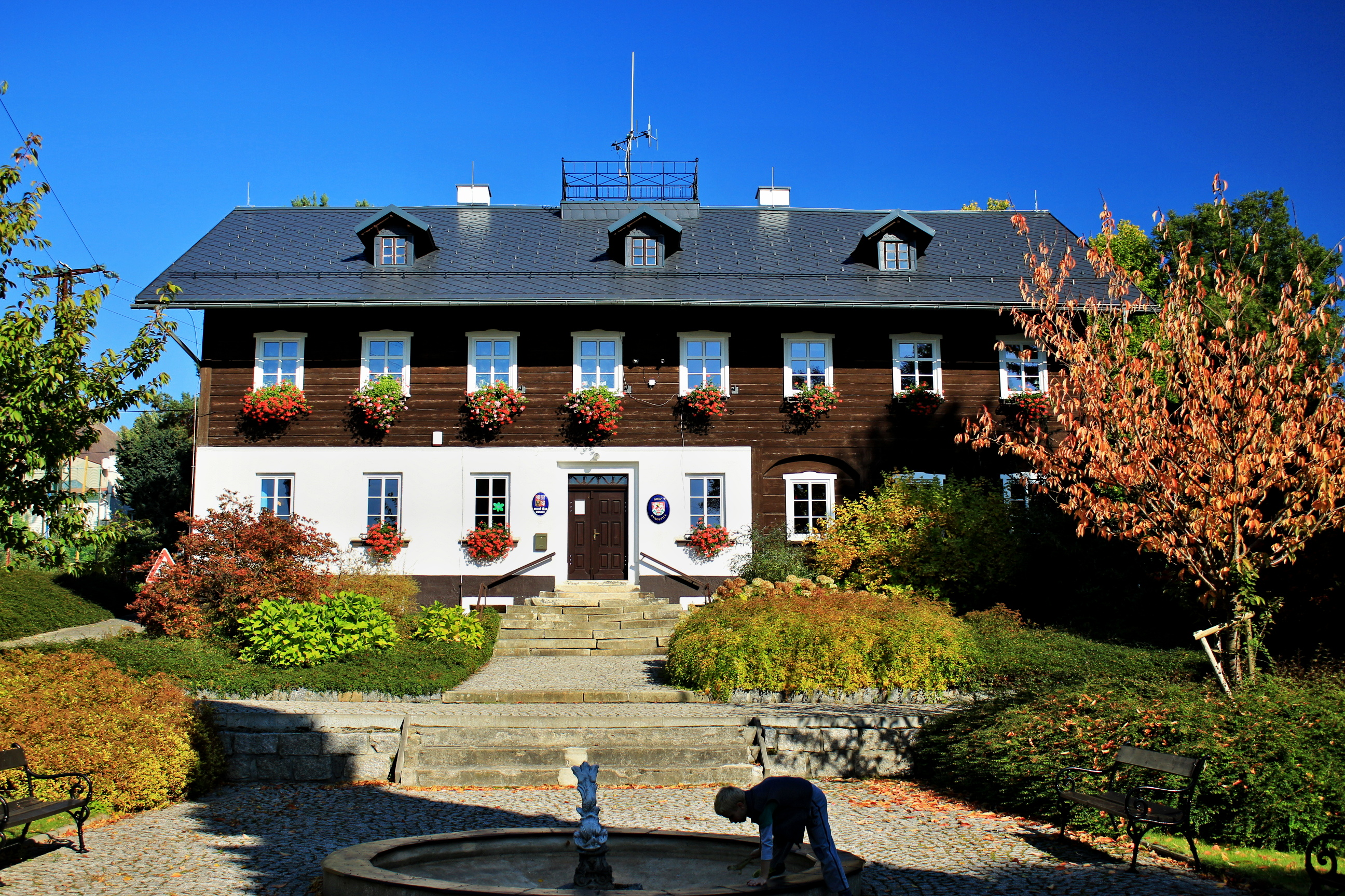 Rynoltice